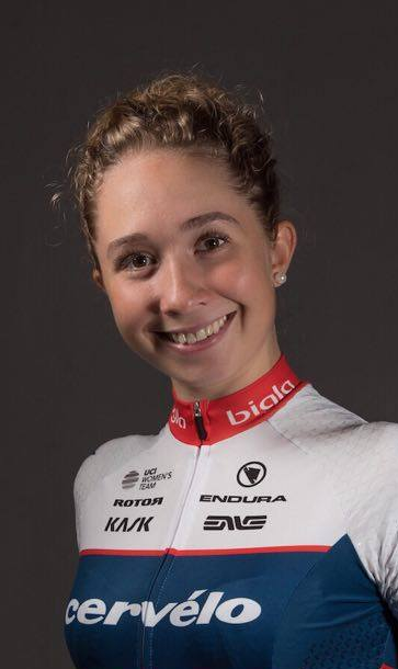 Cecilie Uttrup Ludwig, dänische Radsportlerin